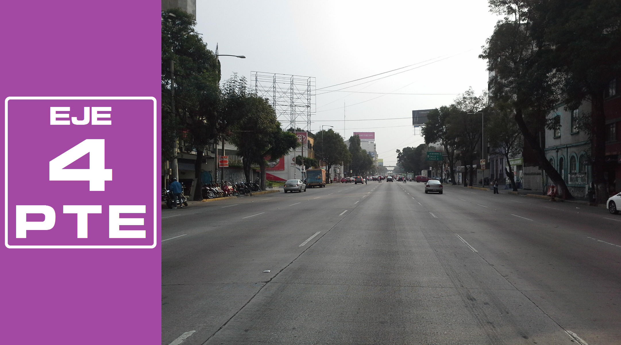 Rediseñado original de la señalética de los Ejes viales de la Ciudad de México por José García (Wiki ID: narumiyama)